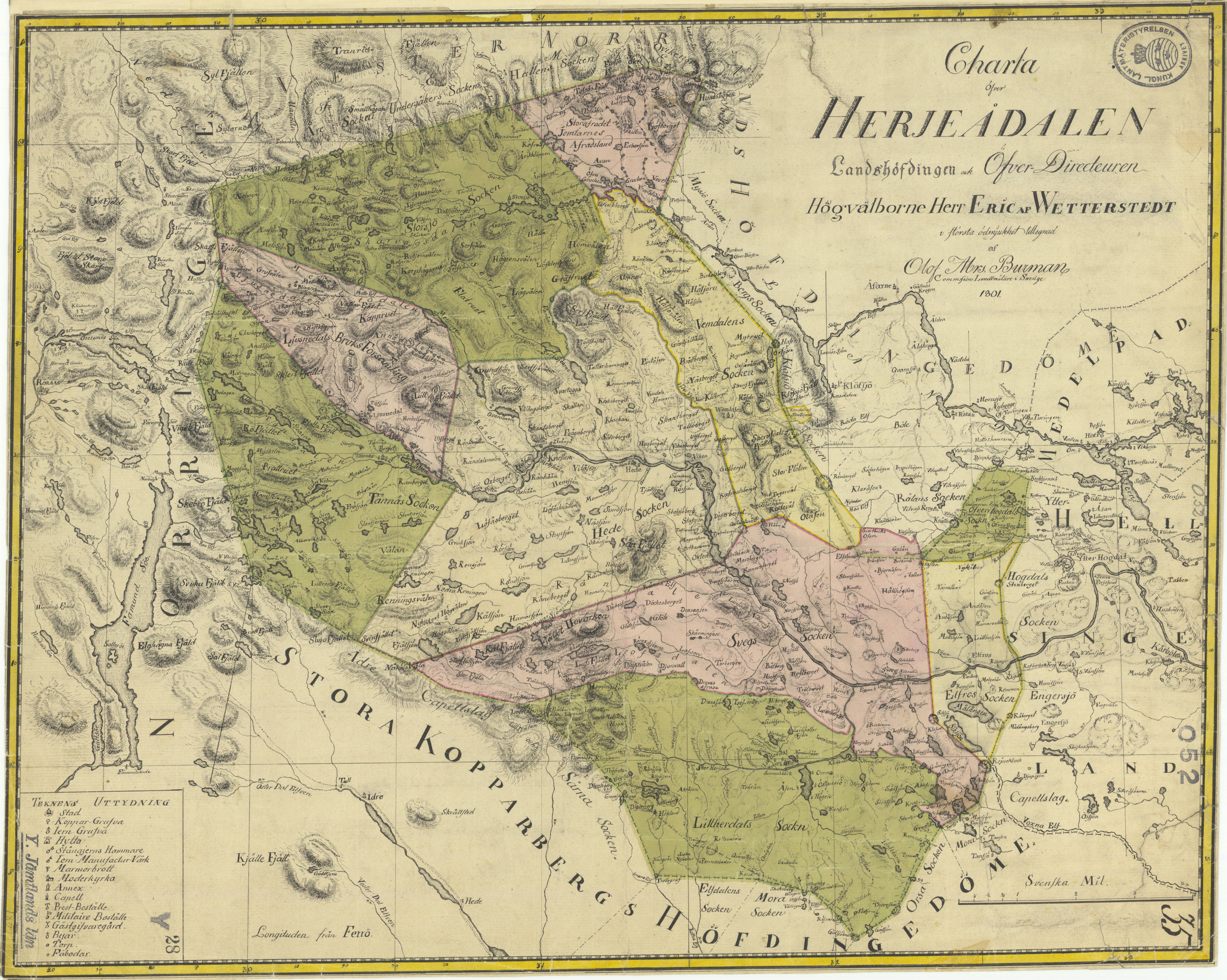 Karta av Olof Burman tillägnad Eric af Wetterstedt. Kartan täcker Härjedalen.